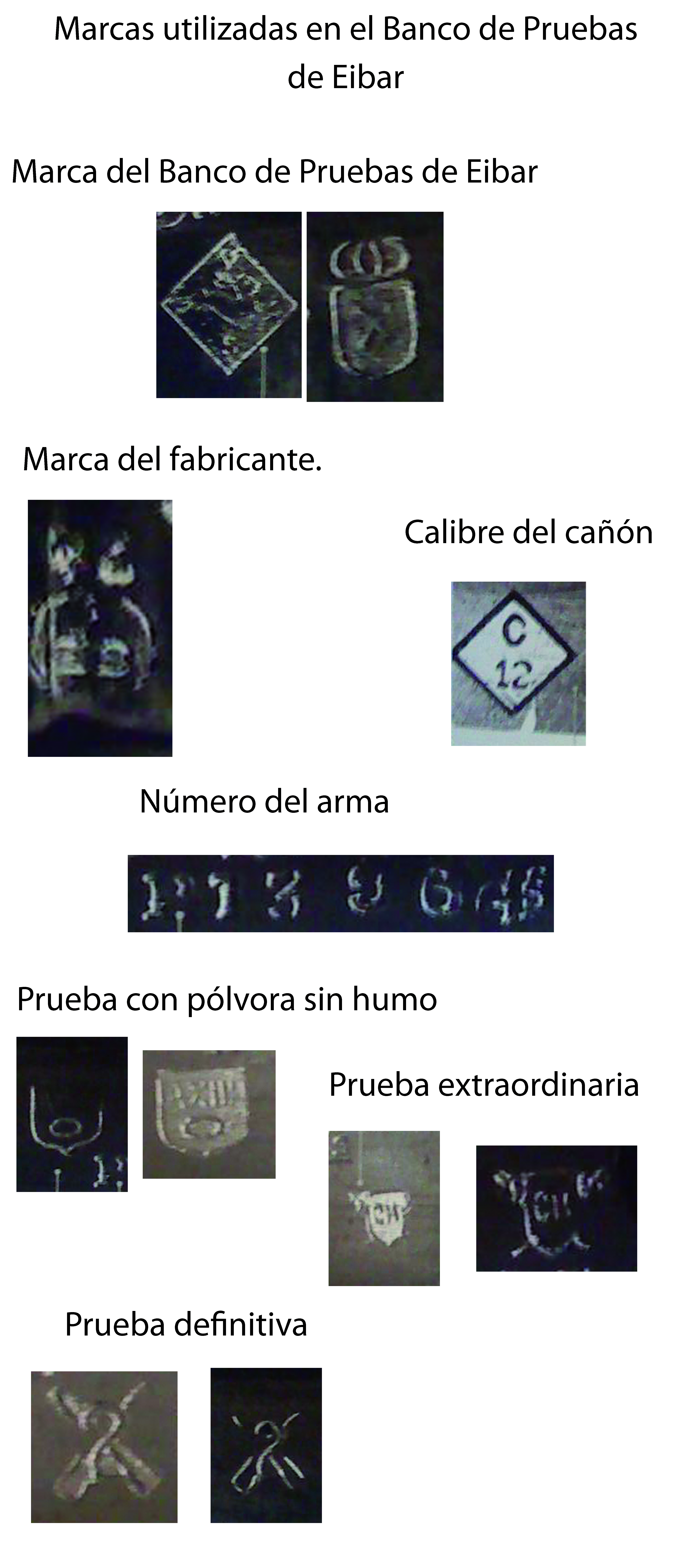 Punzones usados en el Banco de Pruebas de armas de Eibar.